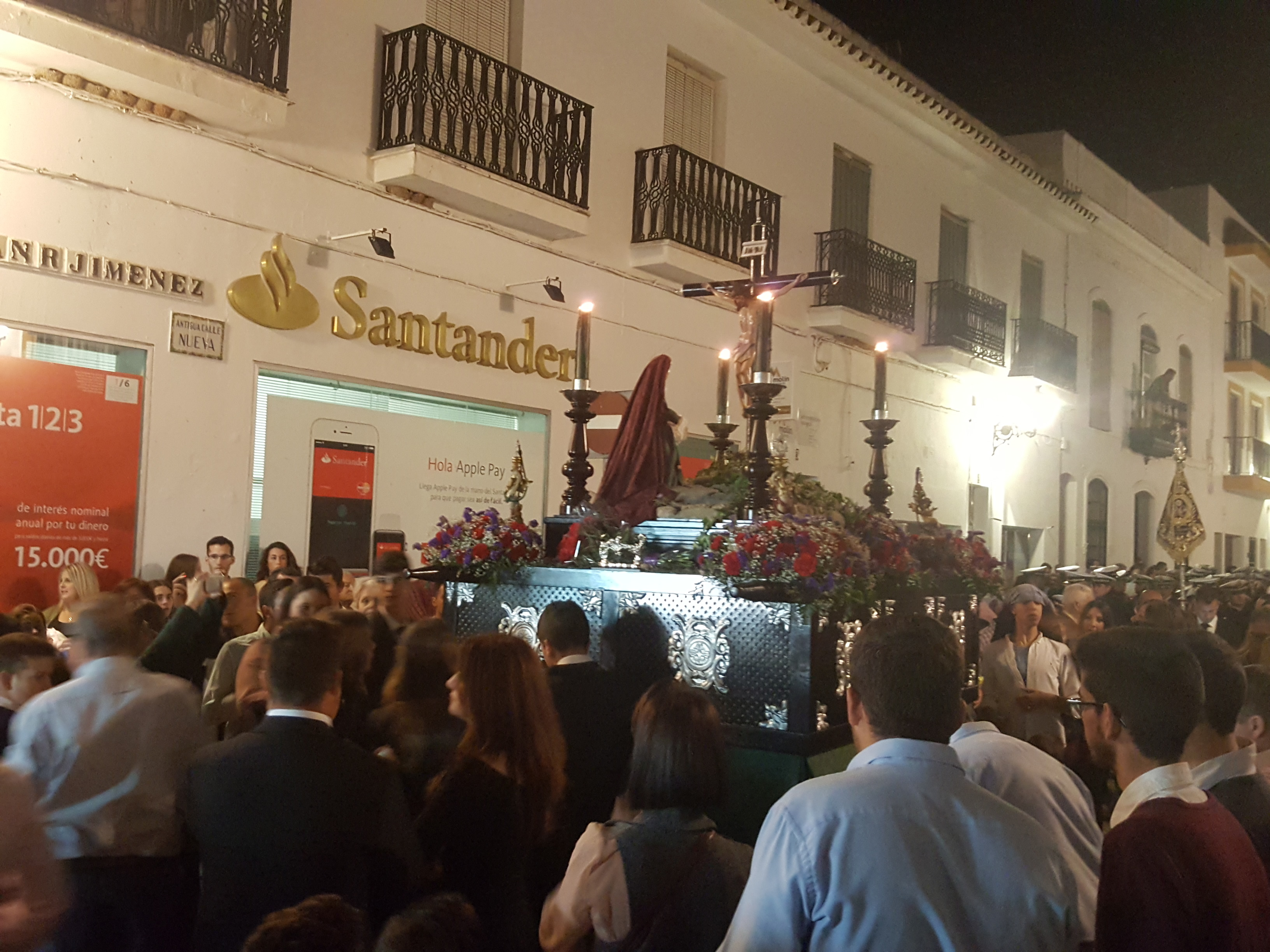 "Hermandad de los Niños". Agrupación de niños cofrades que sacan en procesión dos pasos el sábado previo al domingo de Ramos. Vista del paso infantil del "Cristo de los niños".